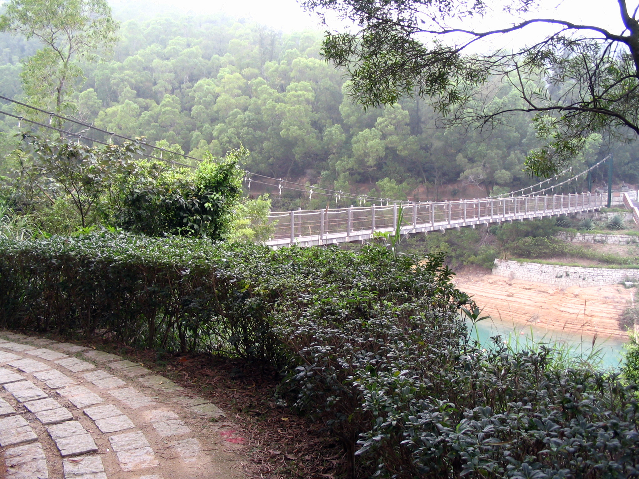 Photo of Parque Natural da Barragem de Hac Sa